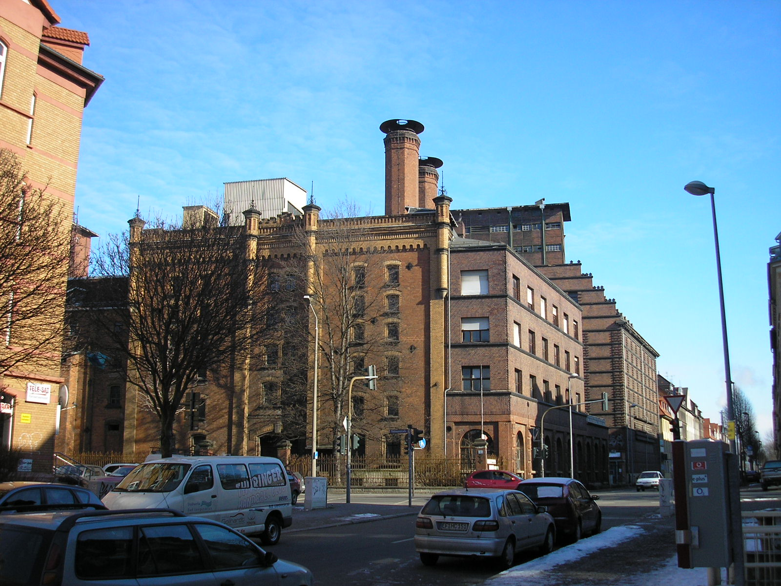 Die ehemalige Malzfabrik Wolff in Erfurt (Thüringen).